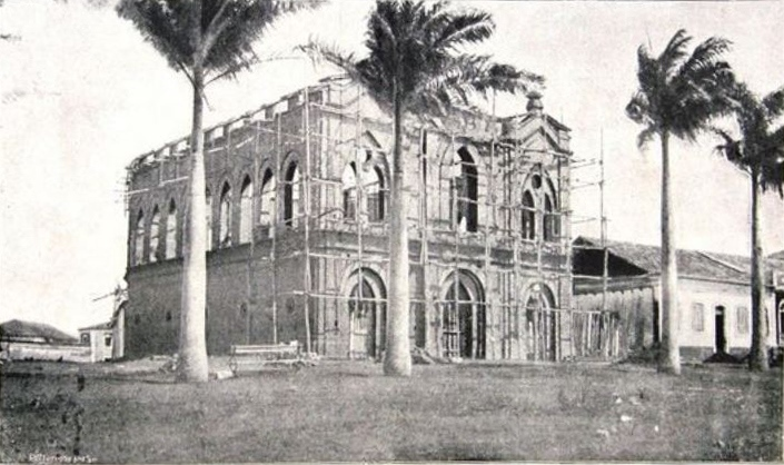 Igreja de Nossa Senhora dos Remédios, em São Luís, ainda em construção, por volta de 1903.